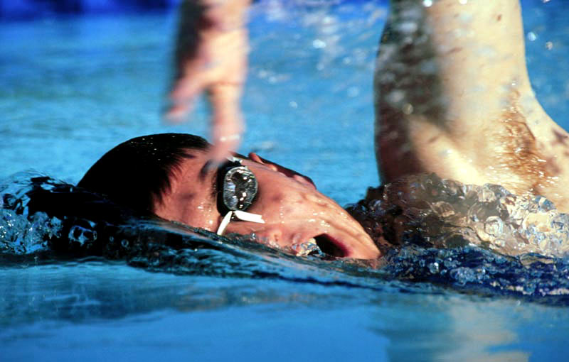 A swimmer swimming